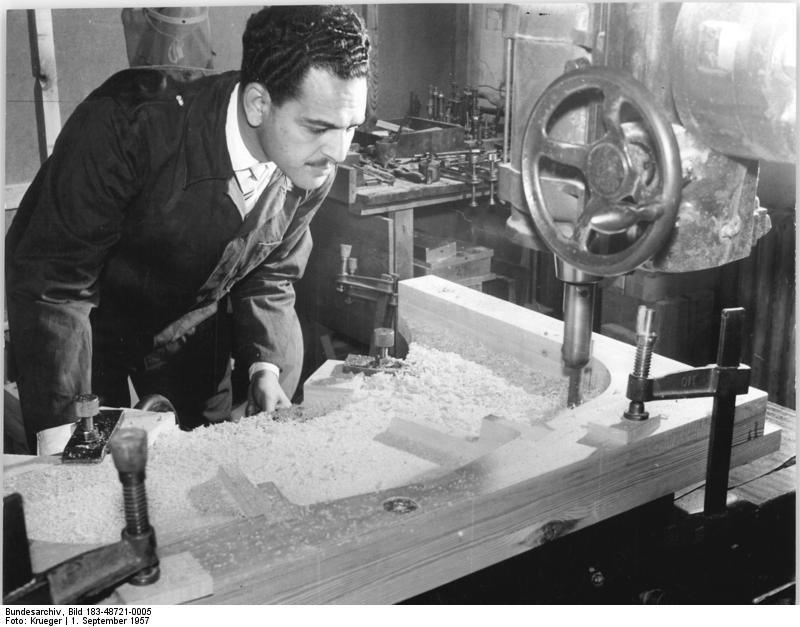 Leipzig, Ingenieure aus Ägypten Zentralbild Krueger 1.9.1957 Ägyptische Ingenieure zum Studium in der DDR Auf Grund von Vereinbarungen zwischen der Regierung der Deutschen Demokratischen Republik und der ägyptischen Regierung studieren zur Zeit drei ägyptische Maschinenbau-Ingenieure am Zentralinstitut für Giessereitechnik in Leipzig. UBz: Ingenieur Salem, der sich besonders für den Modellbau interessiert, beim fräsen eines Holzmodells.